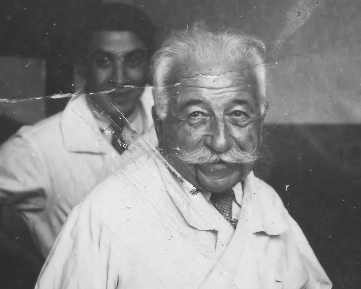 Hôpital Lyon Auguste Lumière